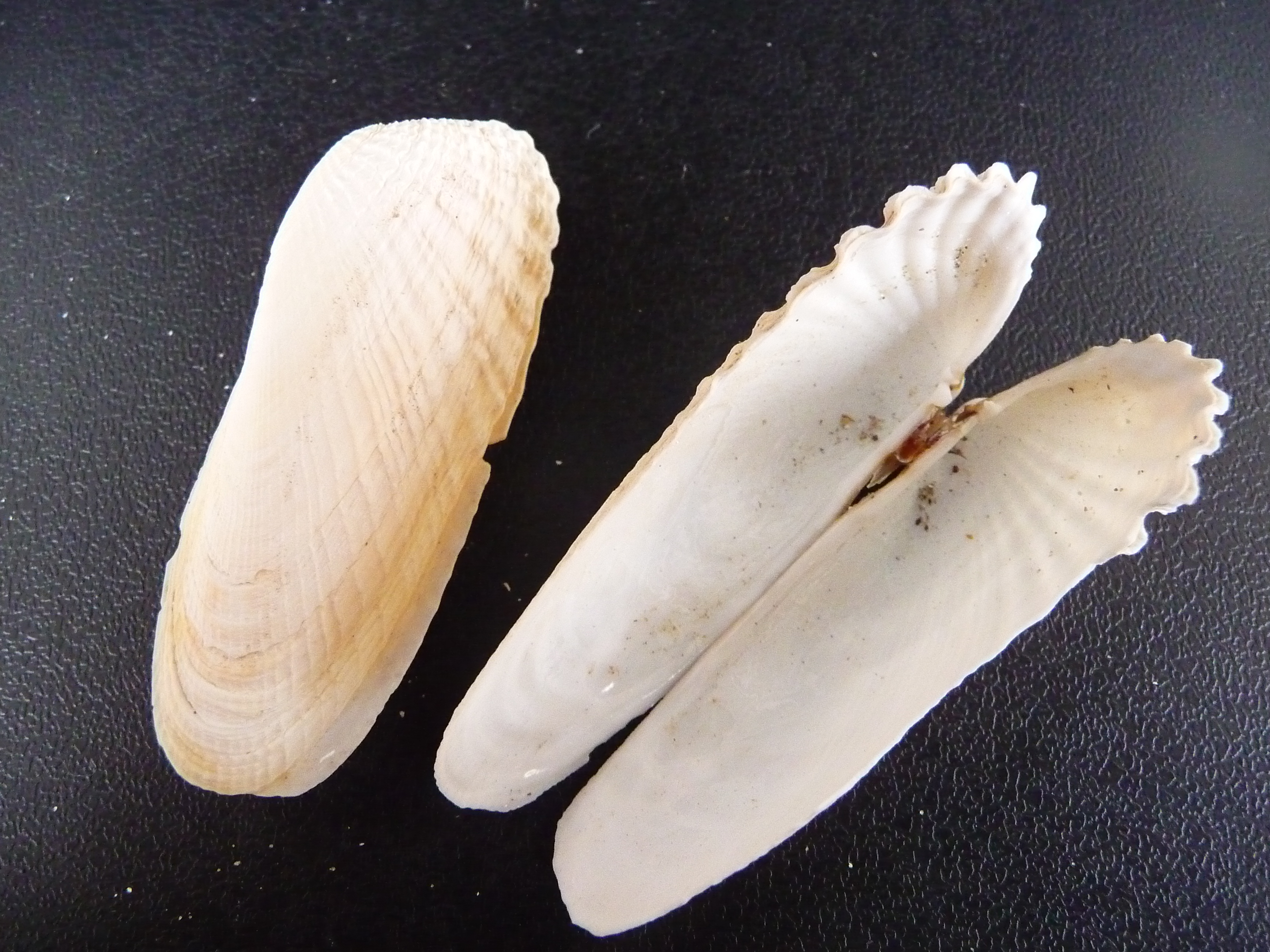 Amerikanische Bohrmuschel, gefunden am Strand von Juist im Mai 2008